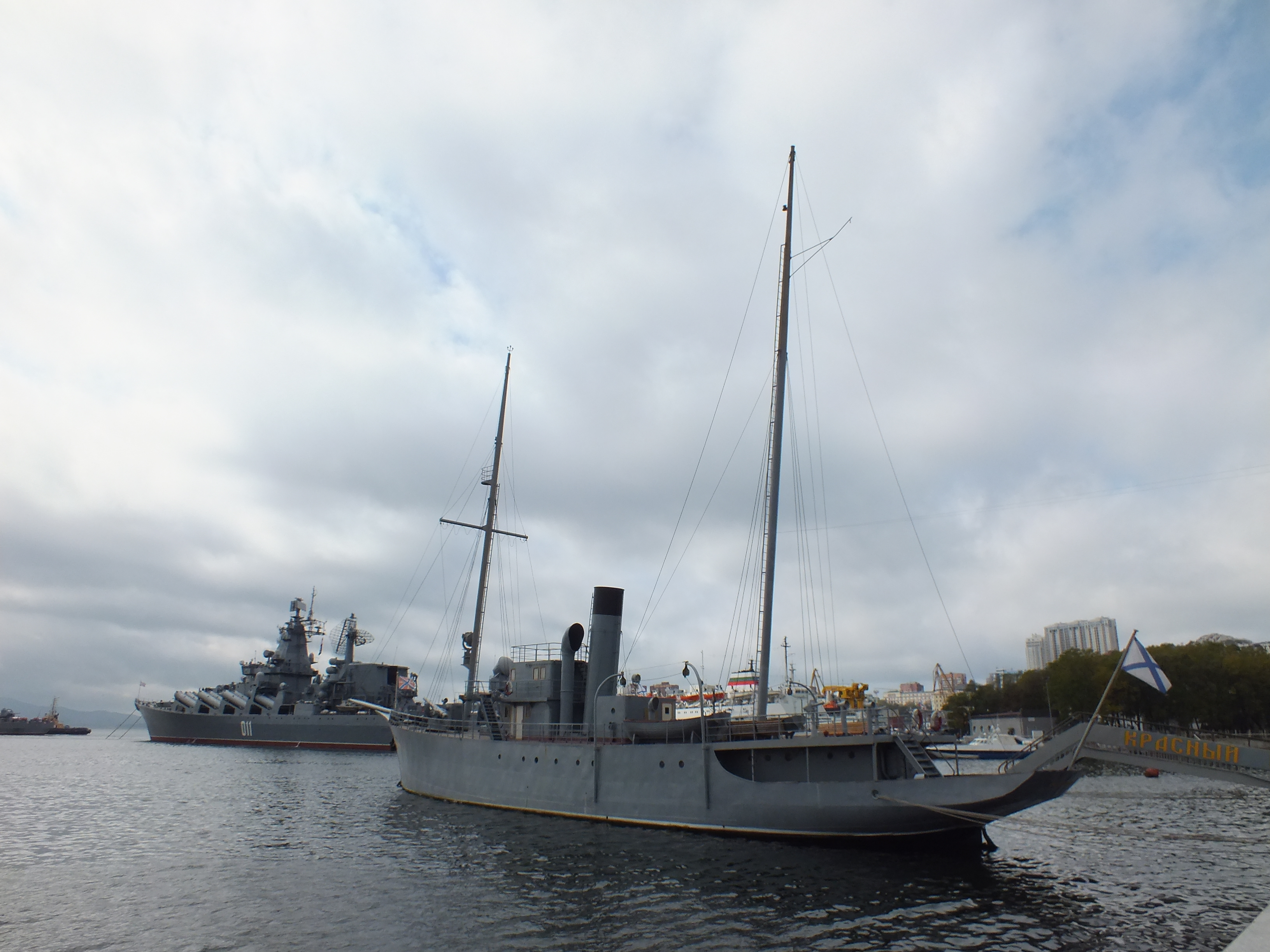 Красный вымпел и Варяг Владивосток 2016